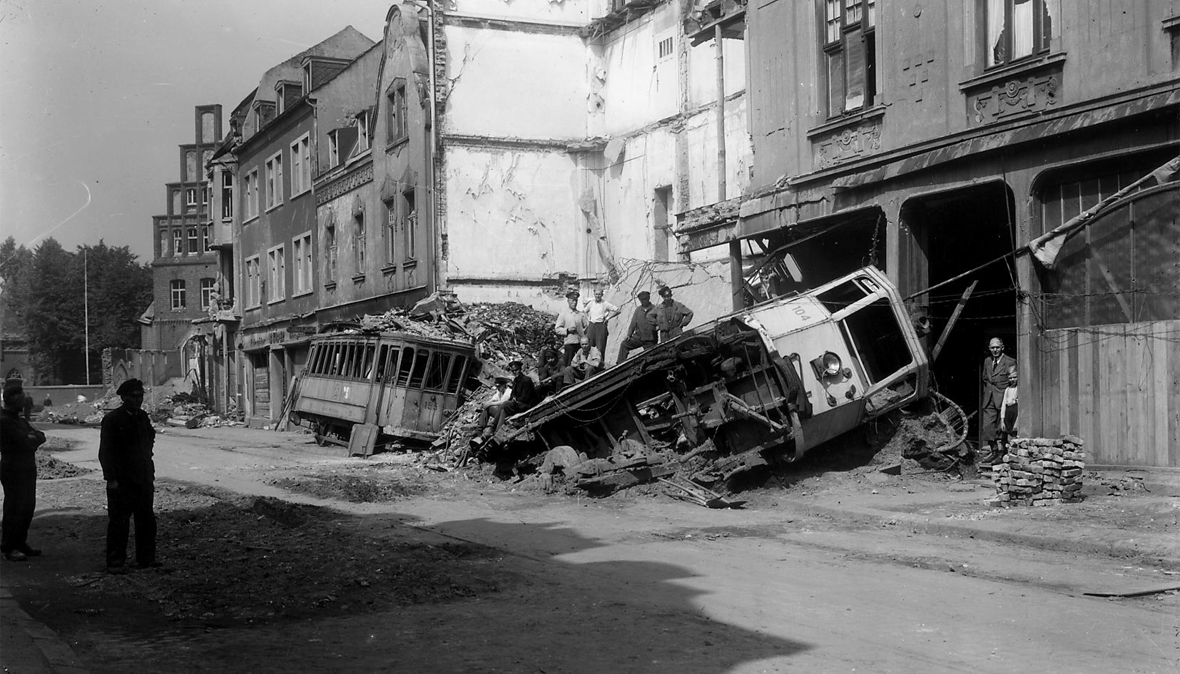 Zerstörungen des Nahverkehrs im 2. Weltkrieg. Hier: Vestische Straßenbahnen in Gladbeck (am Anfang der Rentforter Straße; ganz hinten das St. Barbara-Hospital mit seiner Stufen-Fassade)